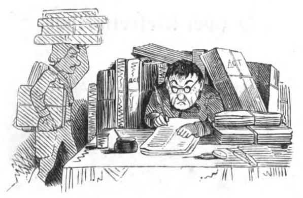 Fliegende Blätter, Volume 1, image on page 62